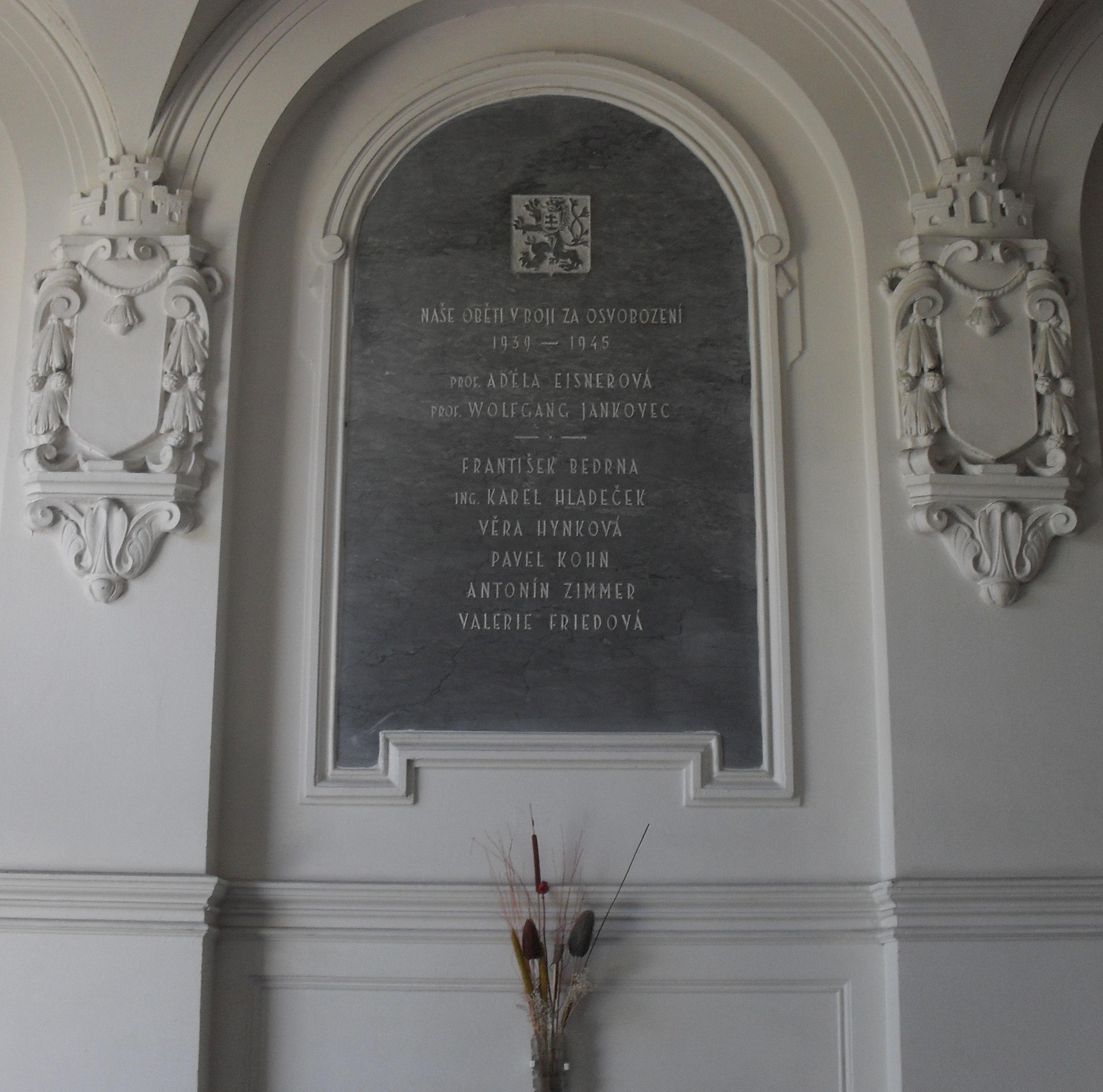 Památník obětem druhé světové ve vstupní hale Teplického gymnázia.